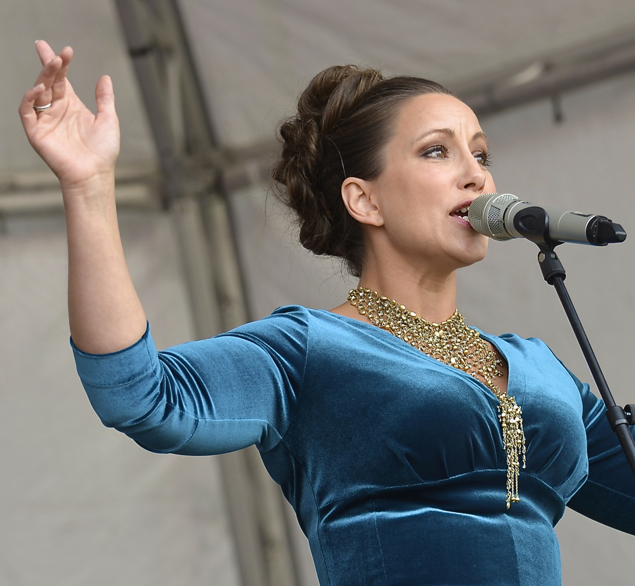 DN-konserten med Kungliga Filharmonikerna på Gärdet vid Sjöhistoriska museet den 17 augusti 2014. Årets solist är sångerskan Lisa Nilsson. Värd är konserthuschef Stefan Forsberg. Dirigent är David Björkman.